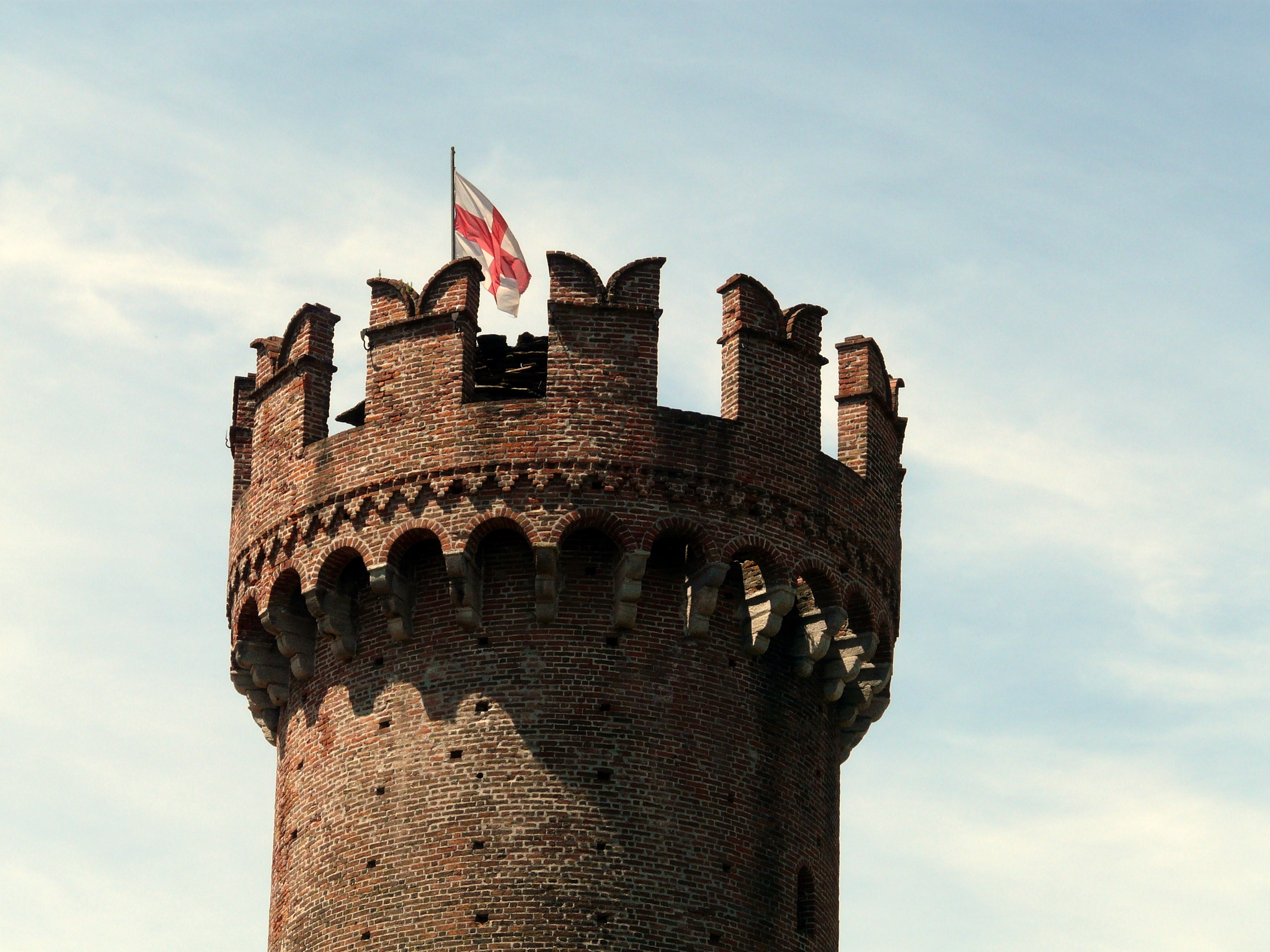 Serie di immagini del castello di Ivrea, Piemonte, Italia